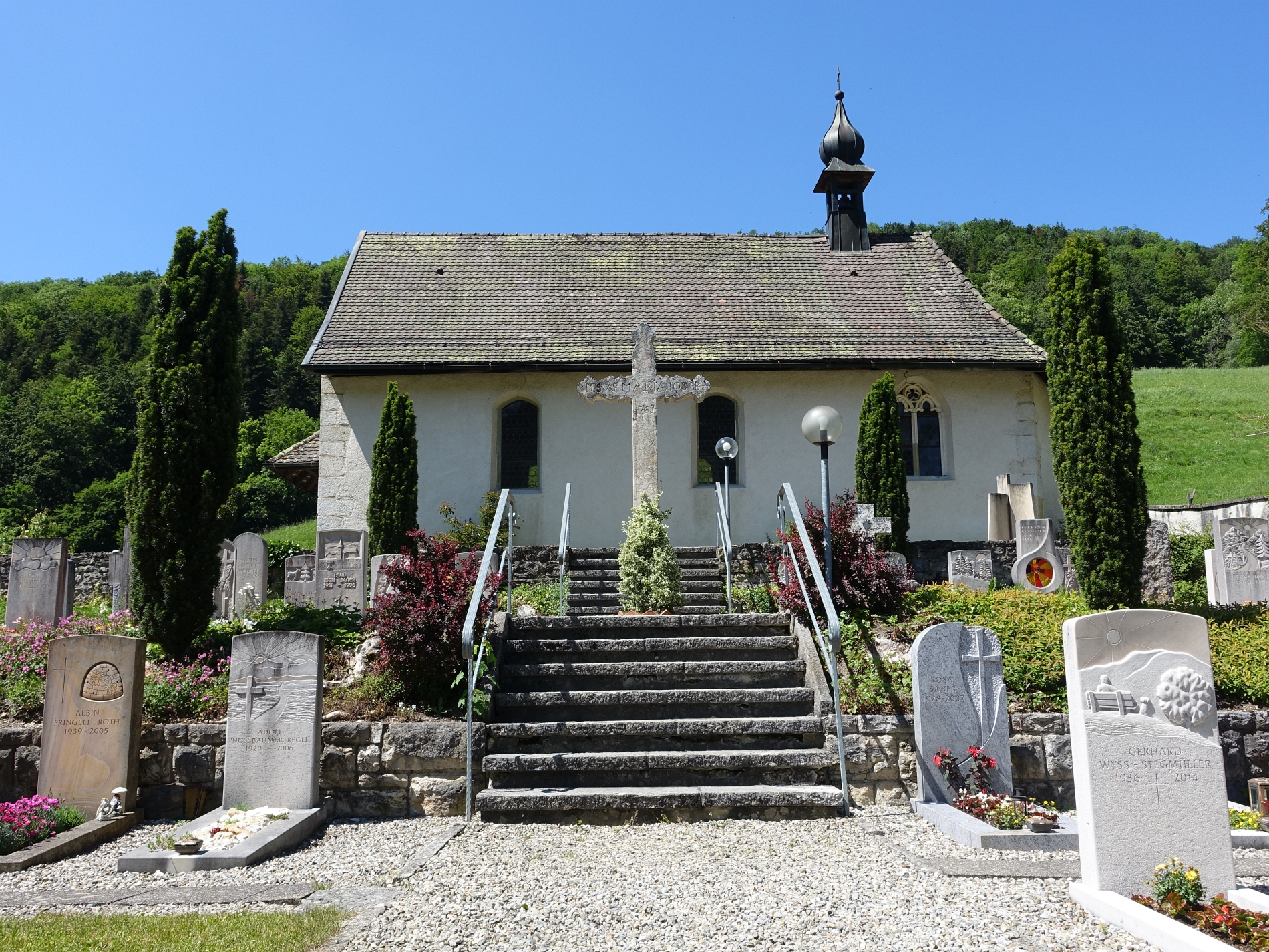 St.-Johannes-Kapelle des Klosters Beinwil, Solothurn, Schweiz